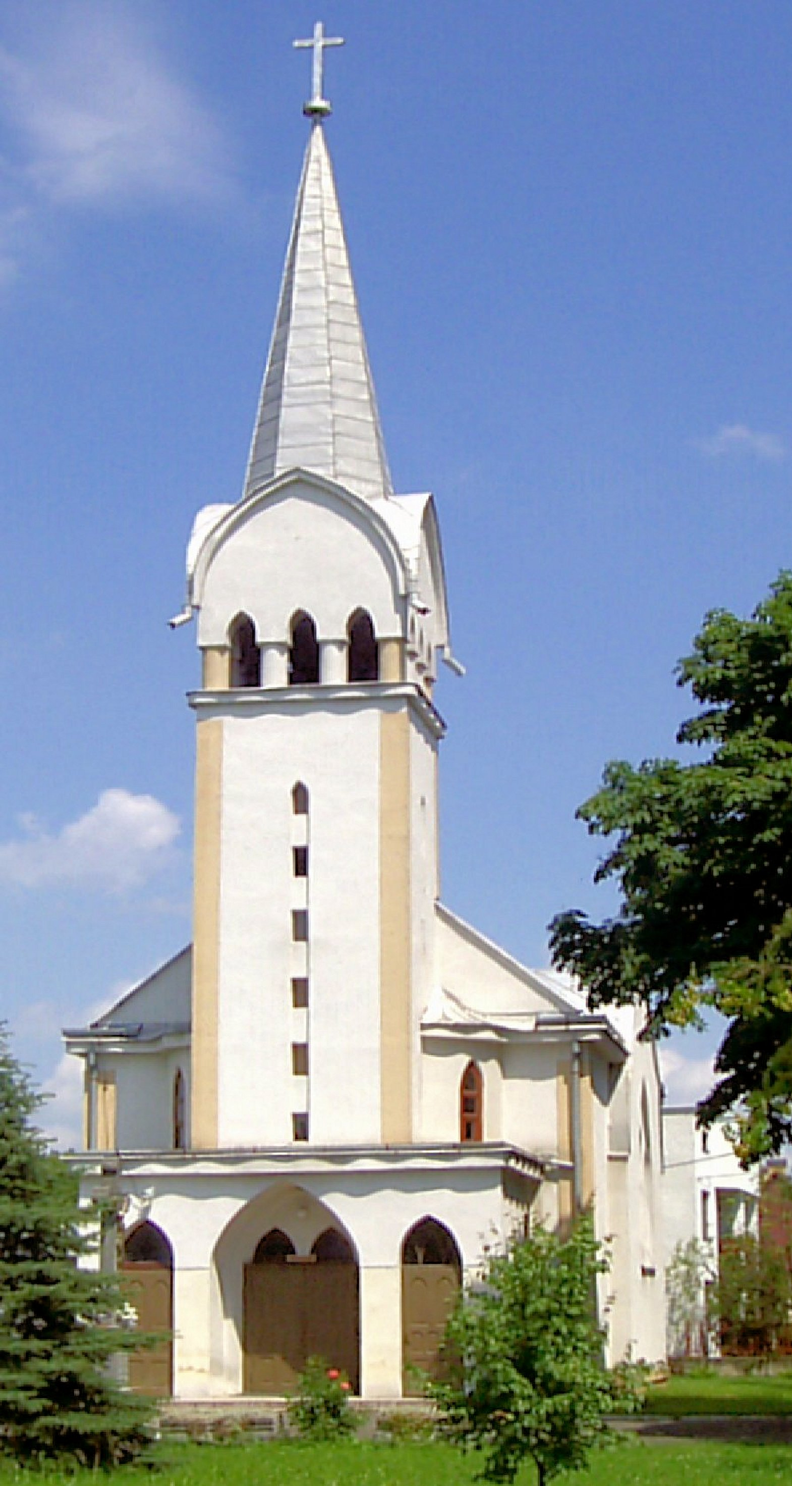 Hudcovce, Rímskokatolícky kostol